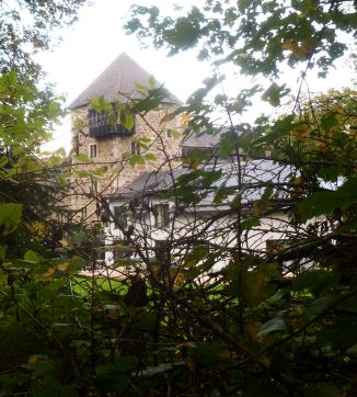 Rosenburg